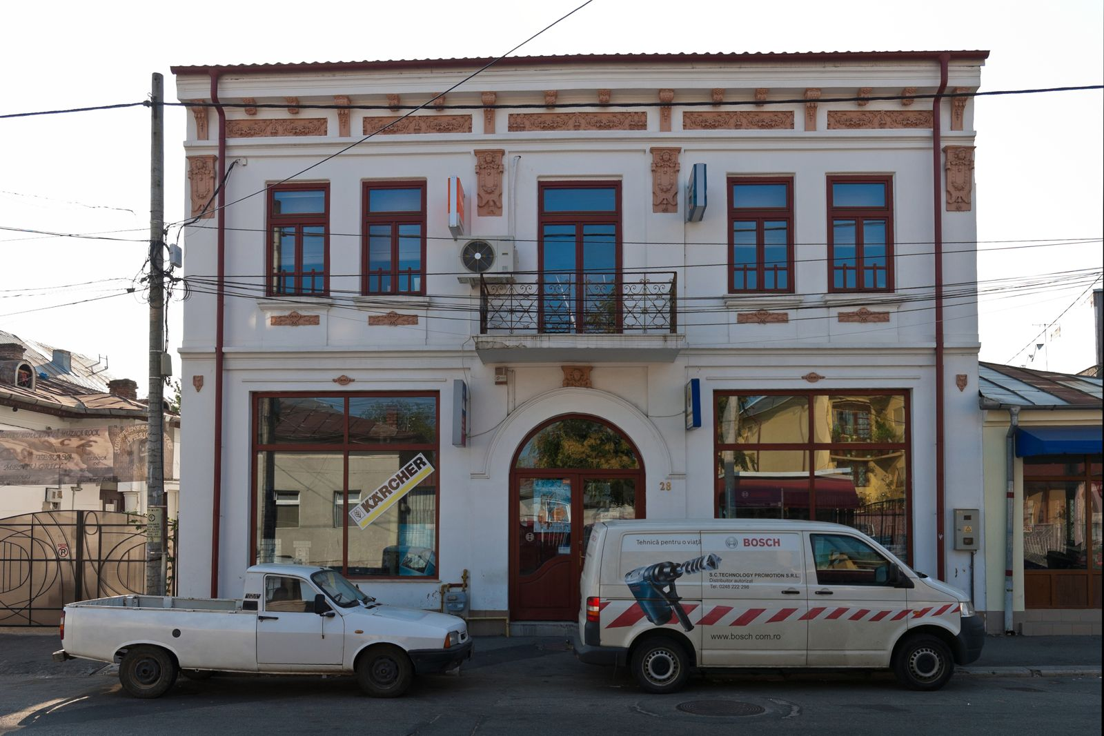 Fotografia prezinta casa Vulcan de pe str. Sfânta Vineri 28, vazuta dinspre V.